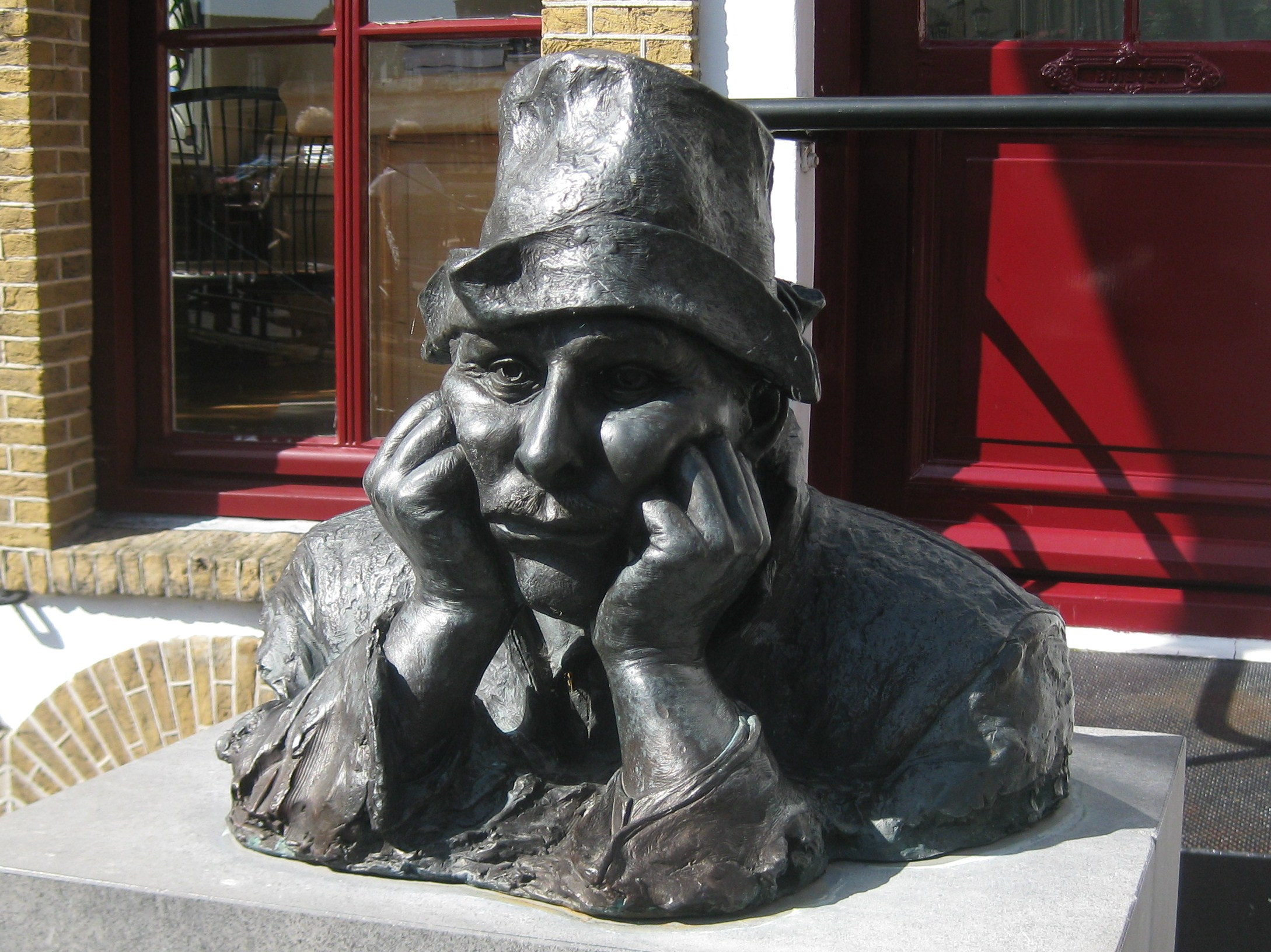 Swiebertje van Cees Vrisekoop op de Visbrug in Oudewater. In 2003 onthuld voor Joop Doderer, maar in 2009 is een replica in brons geplaatst.